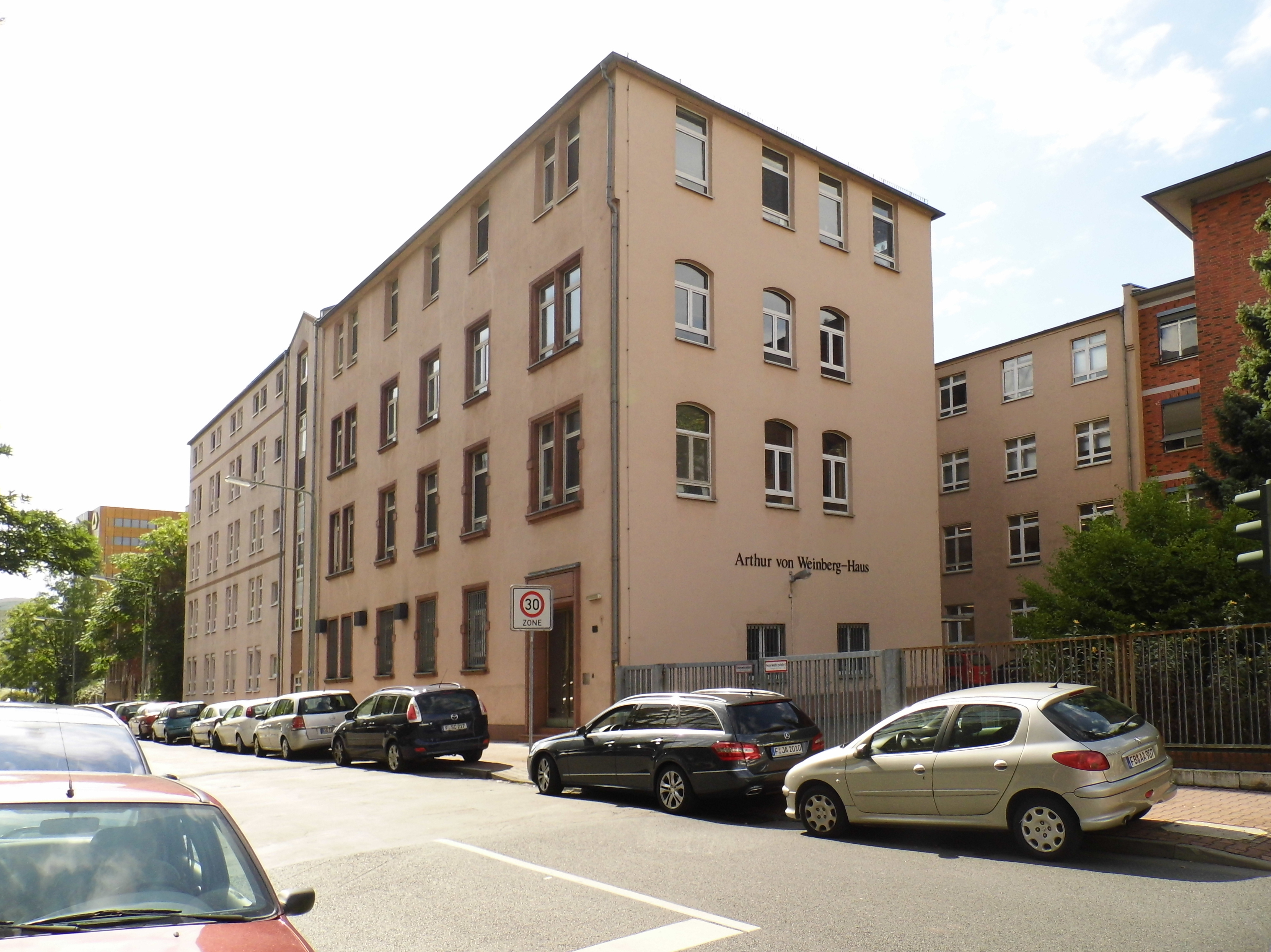 Frankfurt Bockenheim, Kuhwaldstraße, Ecke Voltastaße, Arthur von Weinberg-Haus. Die Immobilie gehörte zur ehemaligen Brillenfabrik Böhler & Co. GmbH. 1982 wurde diese Liegenschaft vom Forschungsinstitut Senckenberg für dessen geologisch/paläontologische und botanische Sammlung hergerichtet. Der Umzug erfolgte 1984.